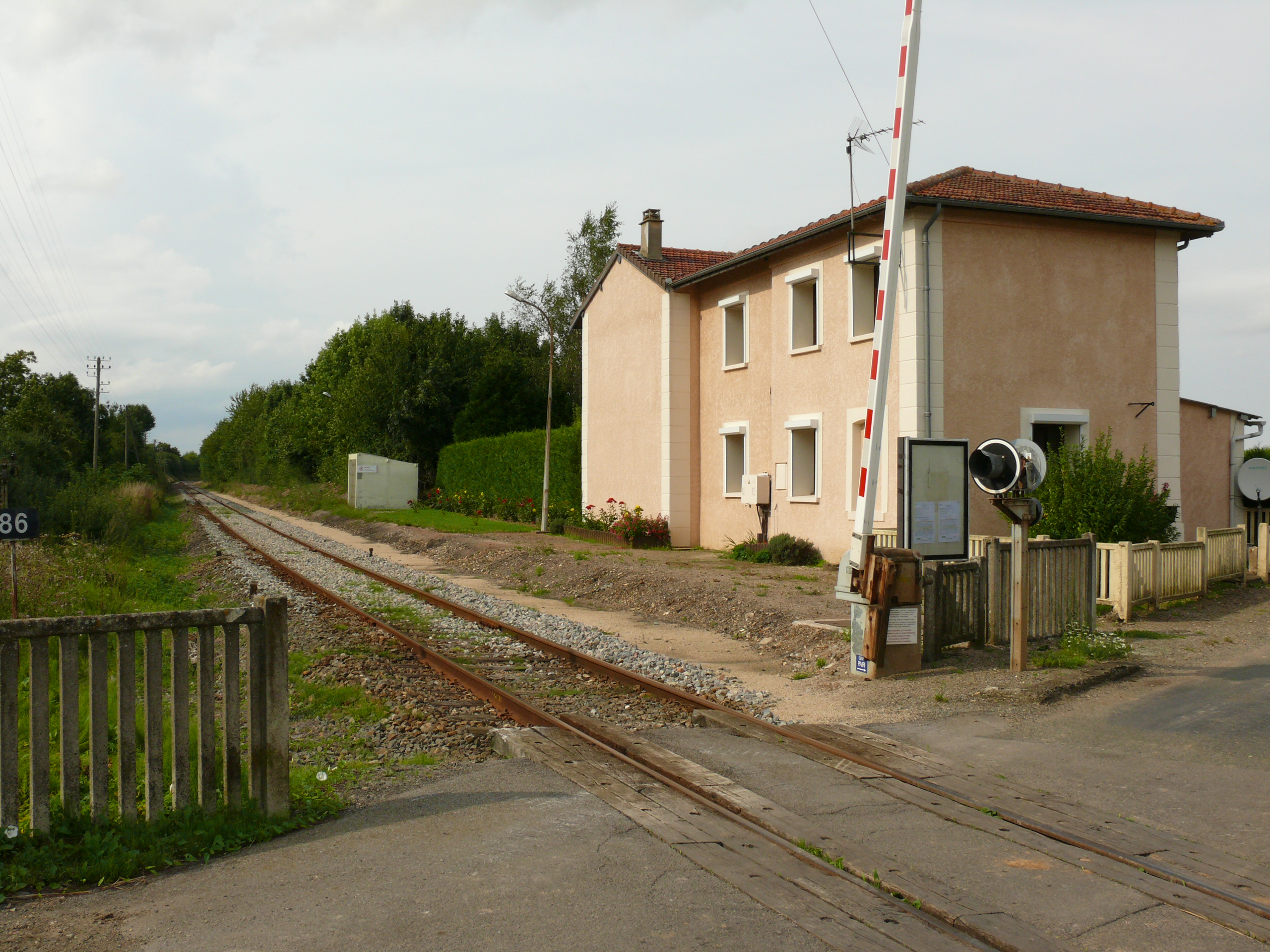 Gare de Grez-Gaudechart (désaffectée)